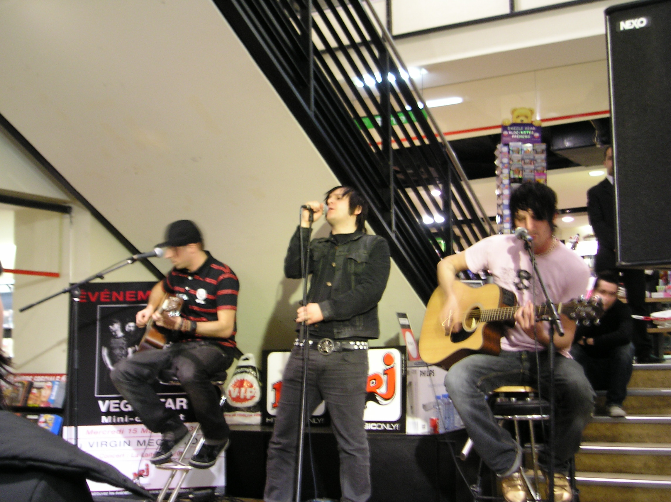 Vegastar au Virgin Megastore de Strasbourg